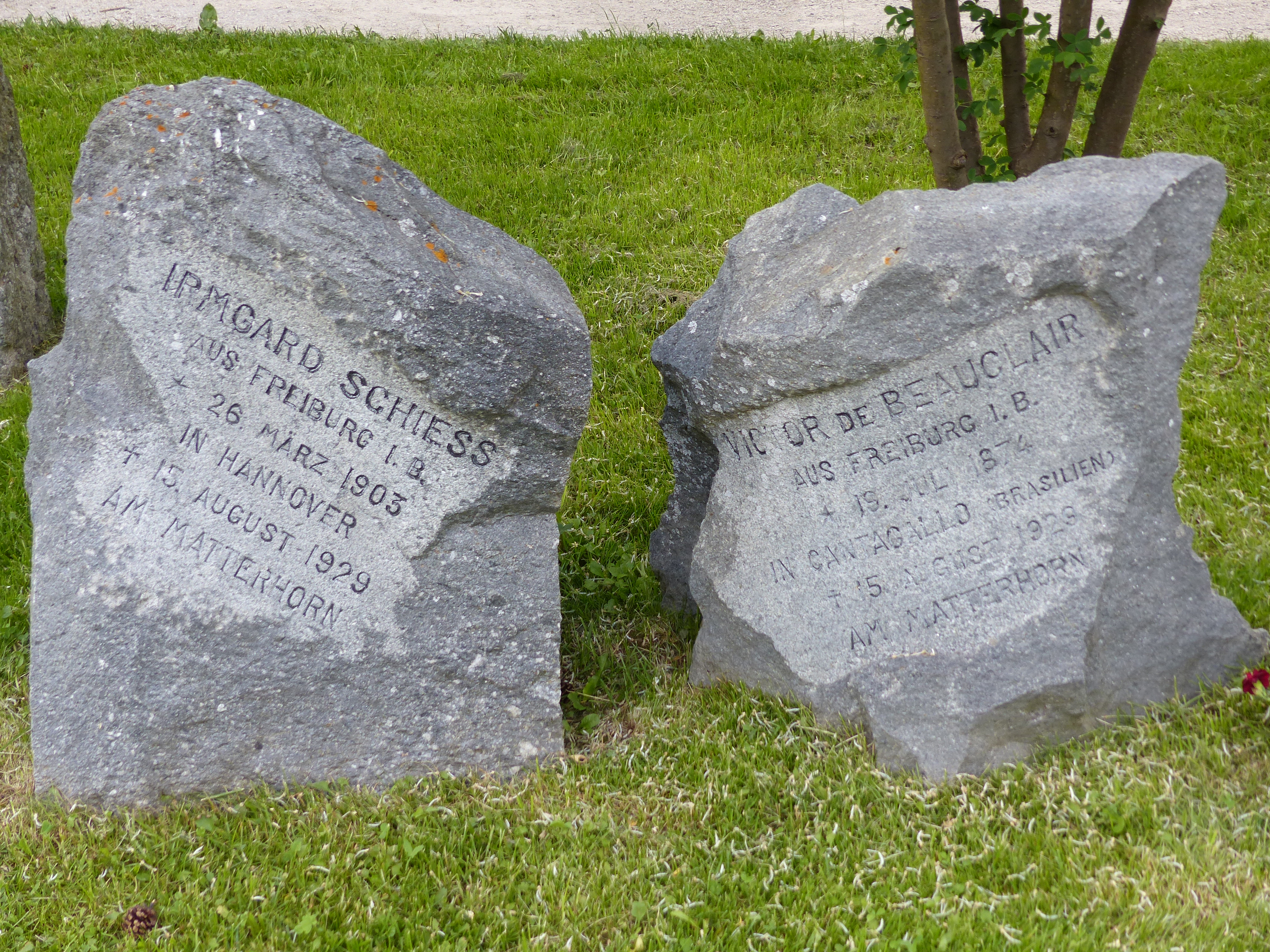 Bergsteigerfriedhof Zermatt: Grabsteine von Imrgard Schiess (* 1903), Victor de Beauclair (* 1874), abgestürzt 15. August 1929.